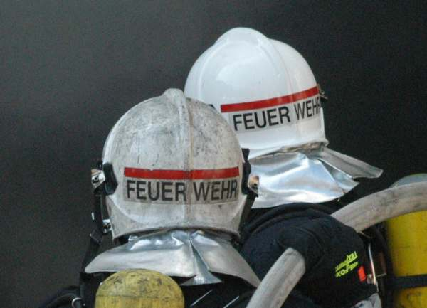 Draeger-Helm der Berufsfeuerwehr Wien im Einsatz